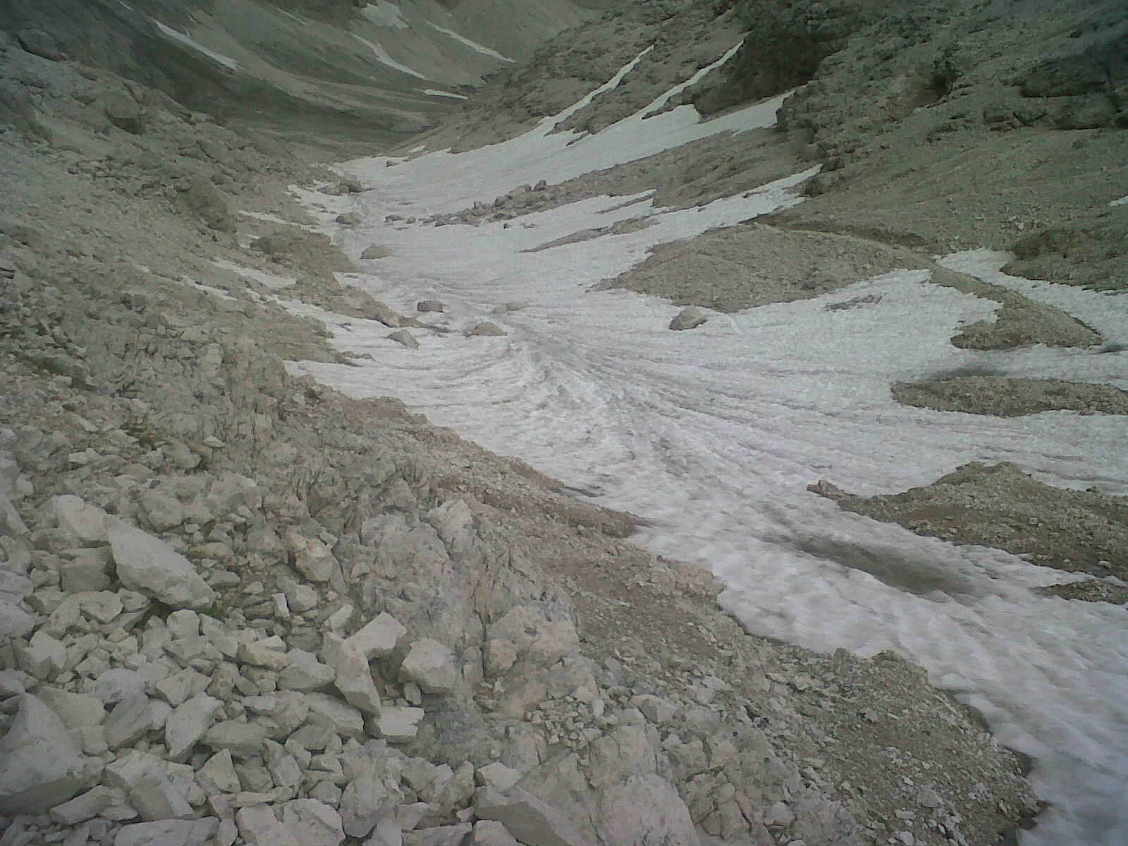 Salita al Passo di Antermoia, 2800 metri, dal vallone di Antermoia: uno sguardo indietro.